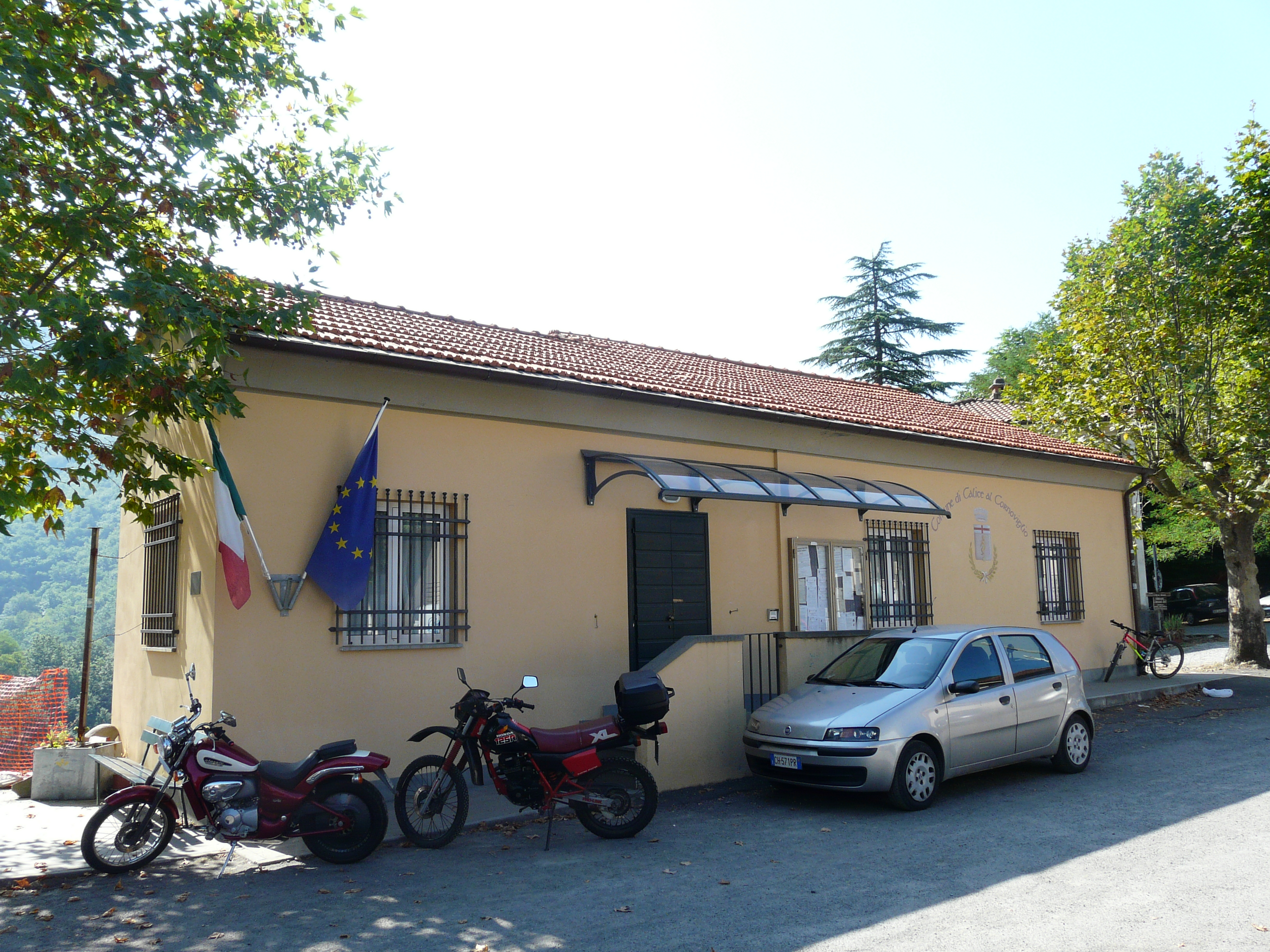 Municipio di Calice al Cornoviglio, Liguria, Italia